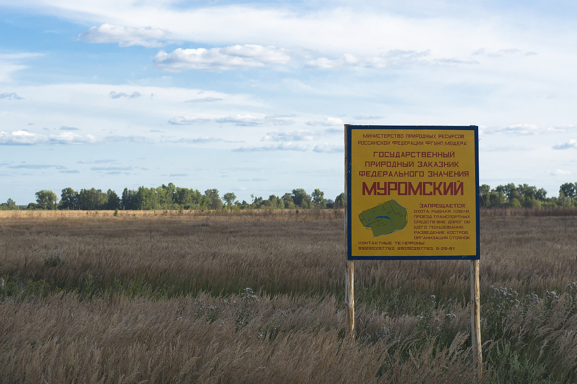 Один из множества информационных знаков, установленных по периметру границы федерального заказника "Муромский".